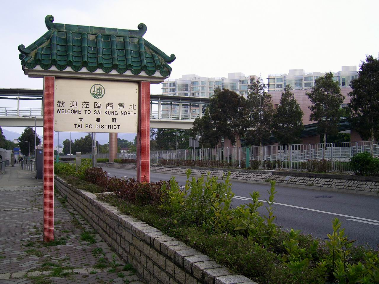 西貢北